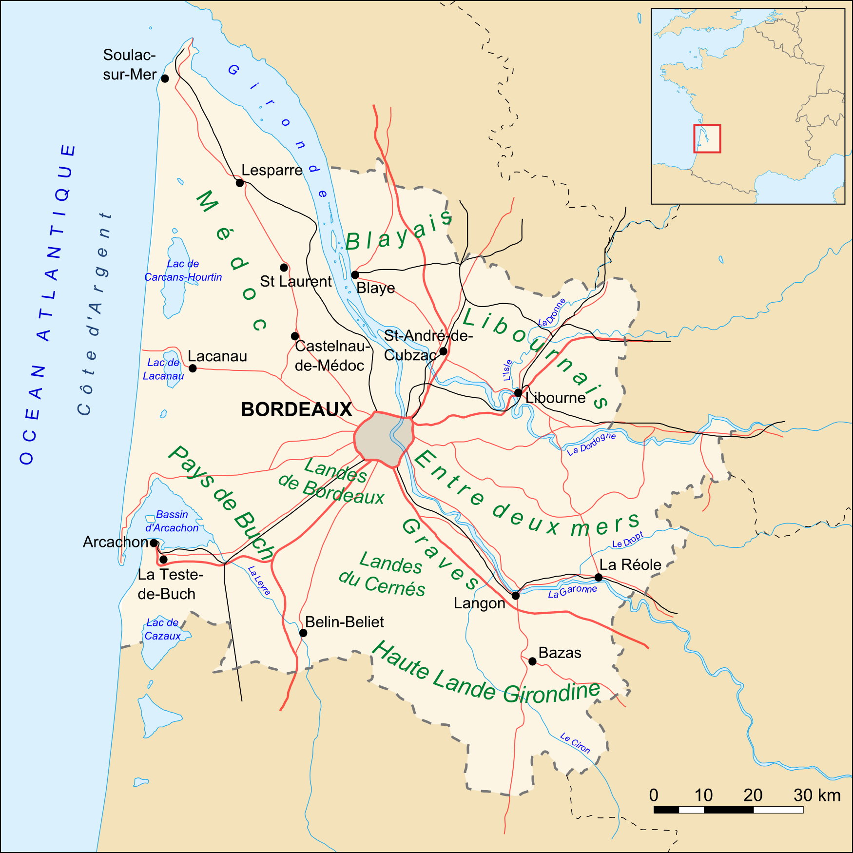 Carte du département de la Gironde (33), routes, villes et "Pays" Based upon Image:Gironde_map_blank.svg created by Sting